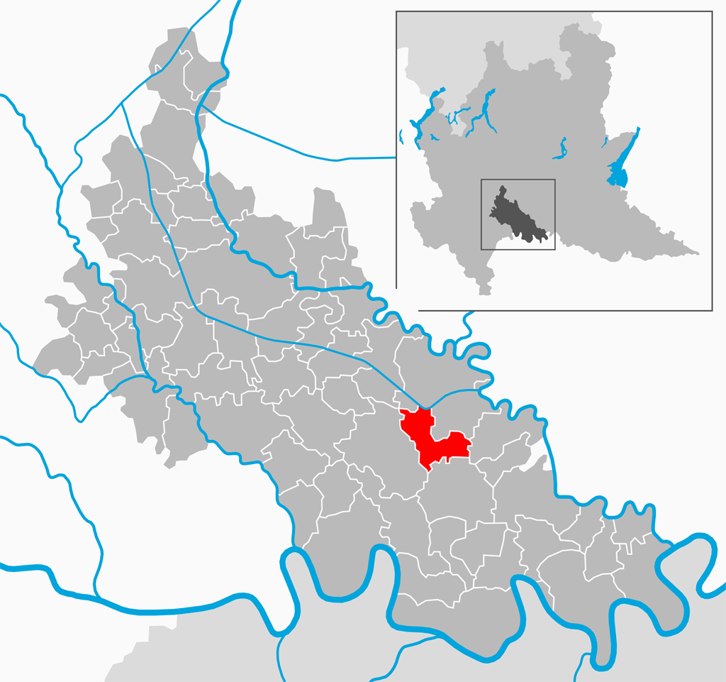 Il comune di Terranova dei Passerini nella provincia di Lodi